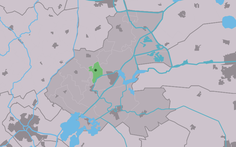 Kaartsje fan himrik fan Friens